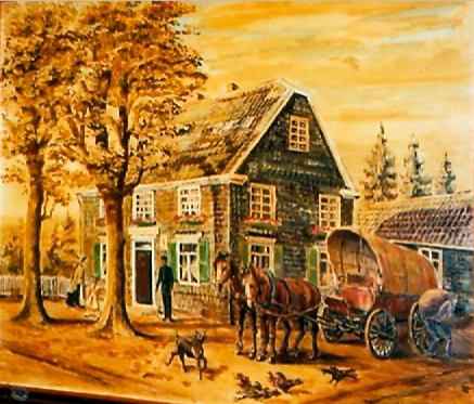 Tente 1910, Foto eines Gemäldes nach einer Postkarte von H. Büchel im Besitz von Fam. Brenzel